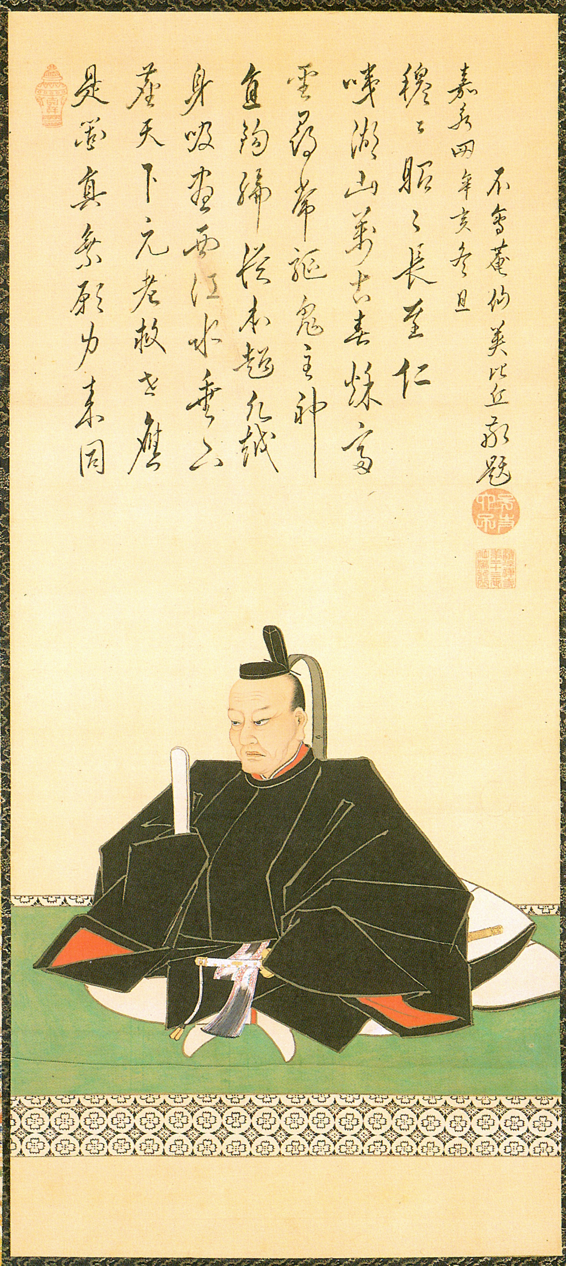 井伊直亮の肖像。